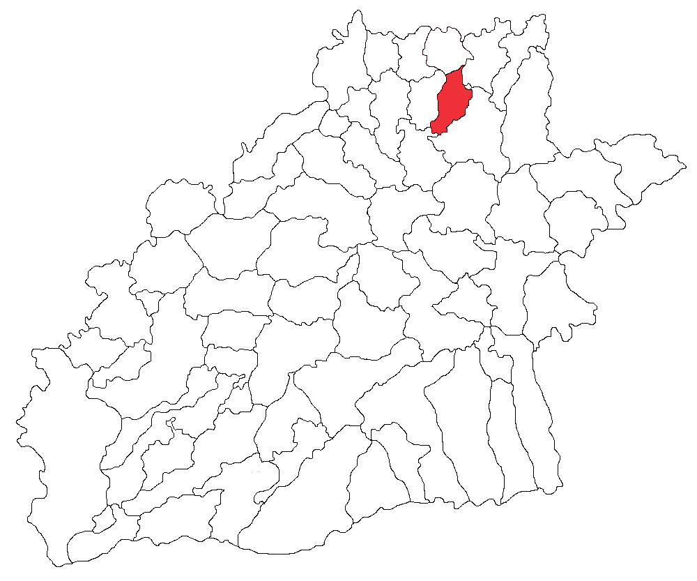 Gemeinde Ațel im Kreis Sibiu in Rumänien (eigenständige Gemeinde seit 2004)